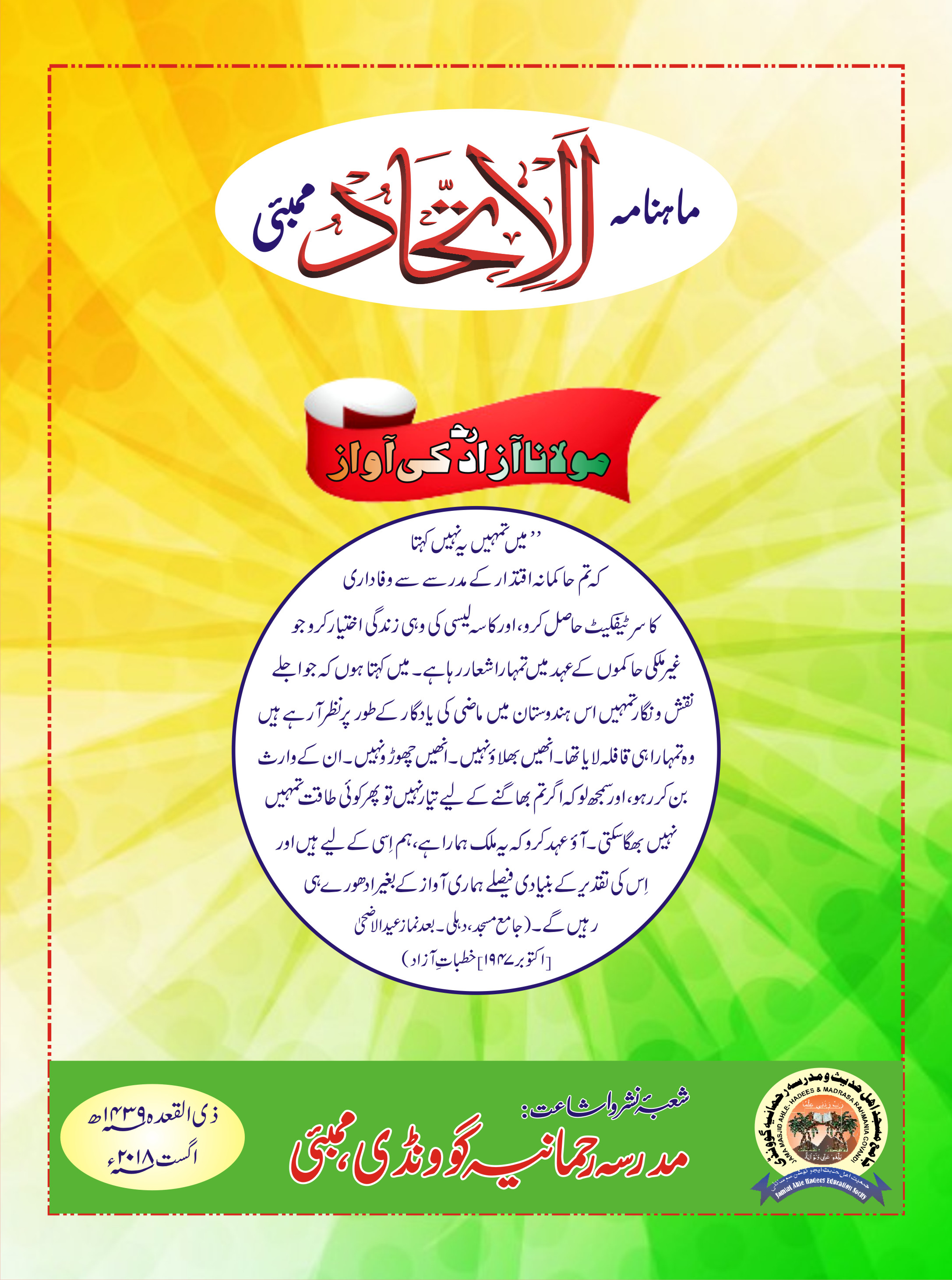 ماہنامہ الاتحاد ممبئی کے اگست شمارے کا ٹائٹل صفحہ